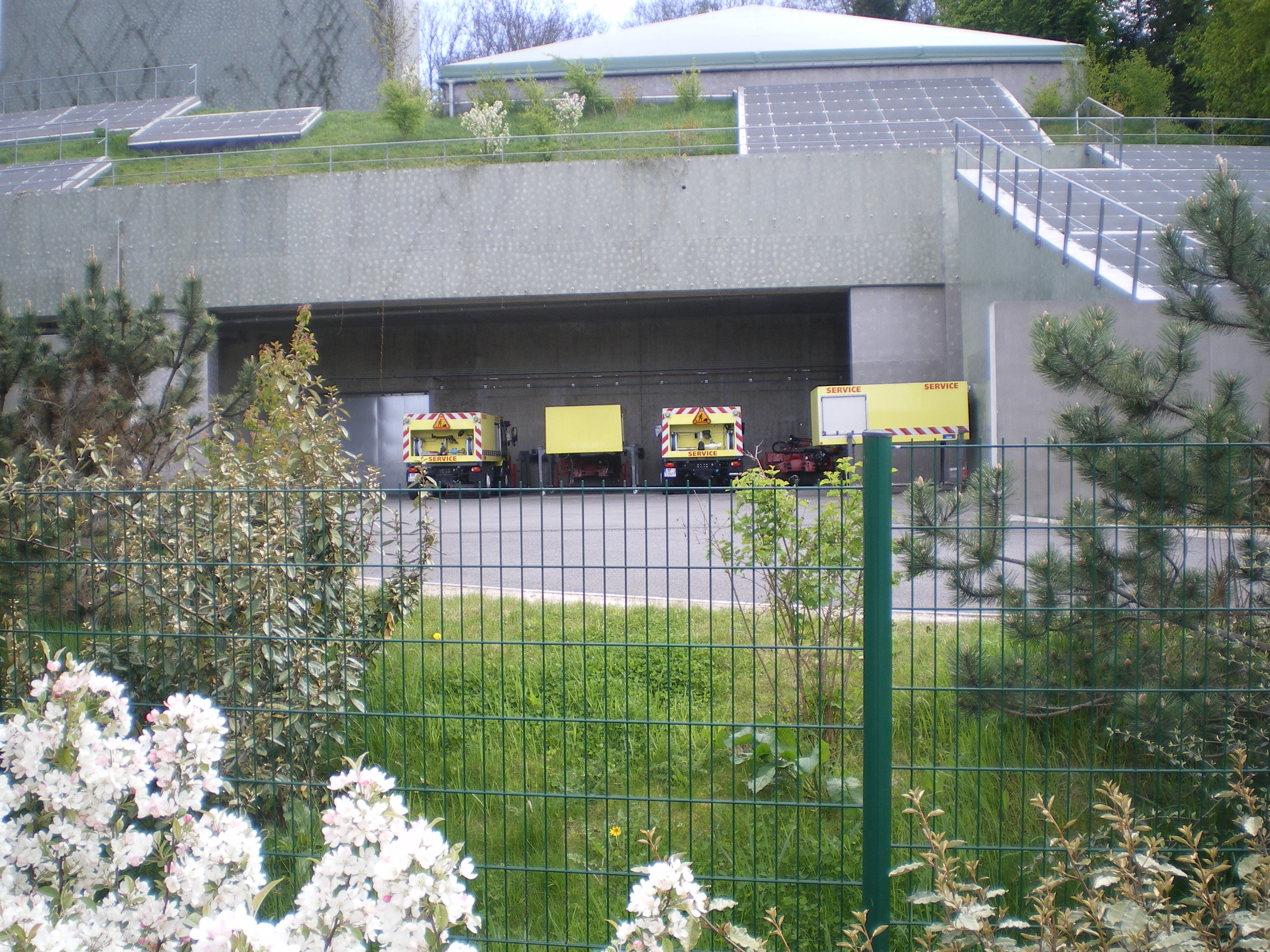 Garage des vehicules d'entretien du Duplex A86